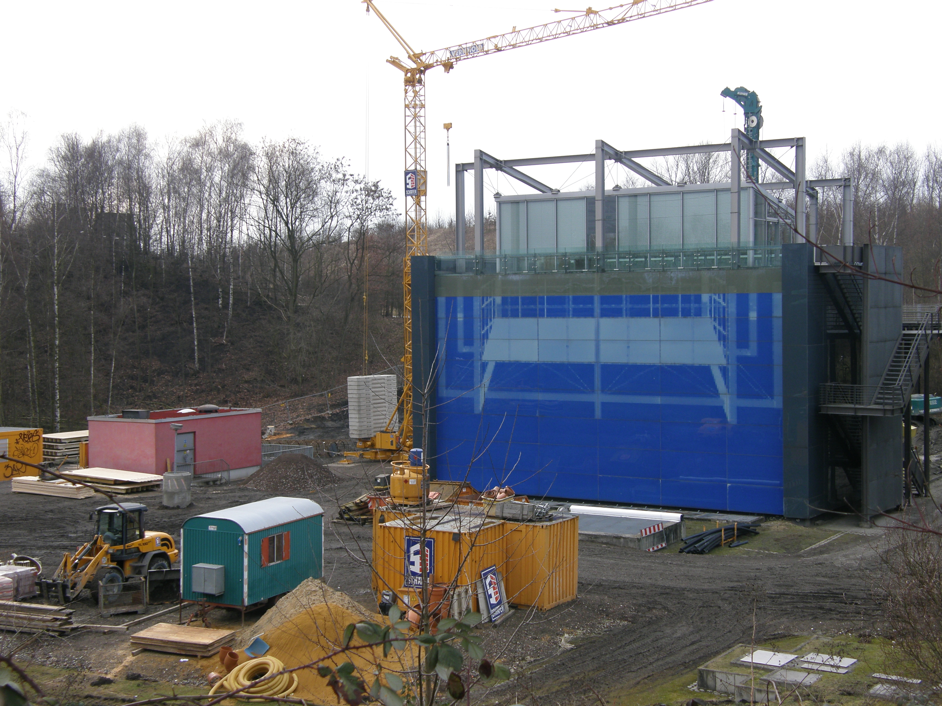 Pumpwerk Horst während der Umbauphase , Umbauarbeiten zur Regenwasserbehandlungsanlage, links das rosafarbene neuere Pumpwerk, rechts das blau verkleidete ältere Pumpwerk Horst, beide schaffen die gleiche Leistung